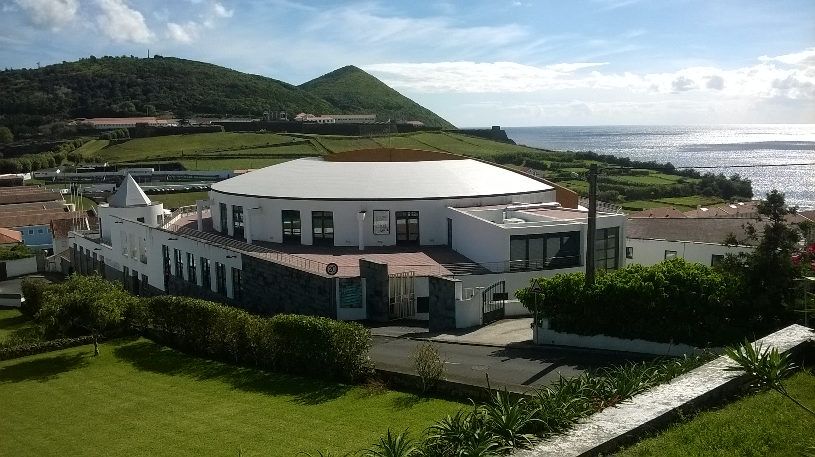 Centro Cultural de Angra do Heroísmo, freguesia da Sé, concelho de Angra do Heroísmo, ilha Terceira, Açores, Portugal. Ao fundo, o Monte Brasil e a Fortaleza de São João Baptista.